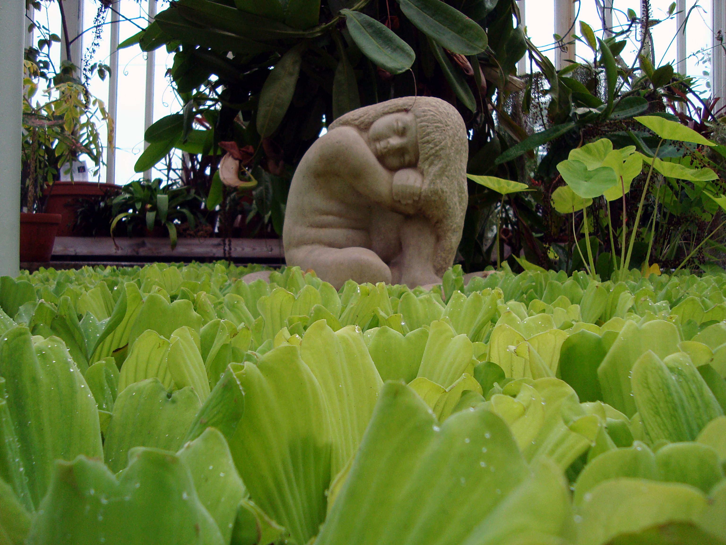 Trädgårdsföreningens trädgård, Göteborg, Sverige.